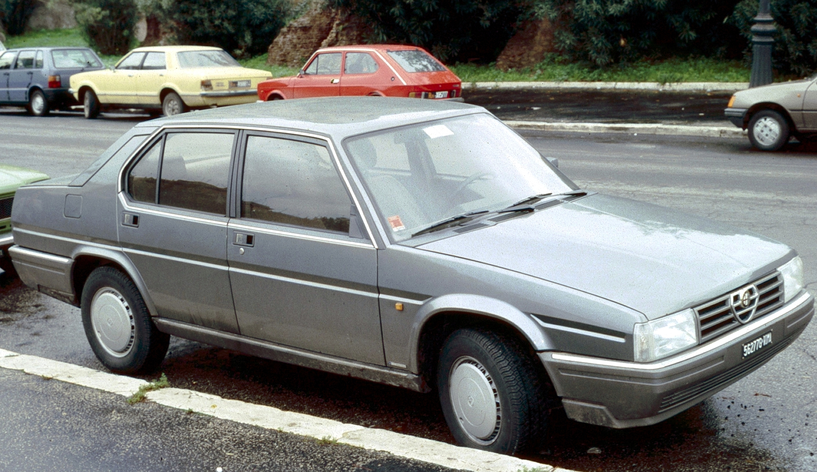 Alfa Romeo Alfa 90